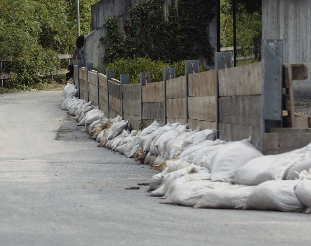 Sandsäcke in Imst